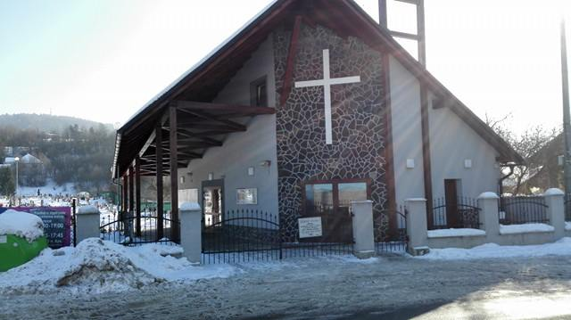 Dom smútku na mestskom cintoríne v Krásne nad Kysucou